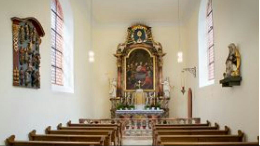 Die Blutskapelle (auch Kapelle zum heiligen Grab) in Lauda. Tabernakel